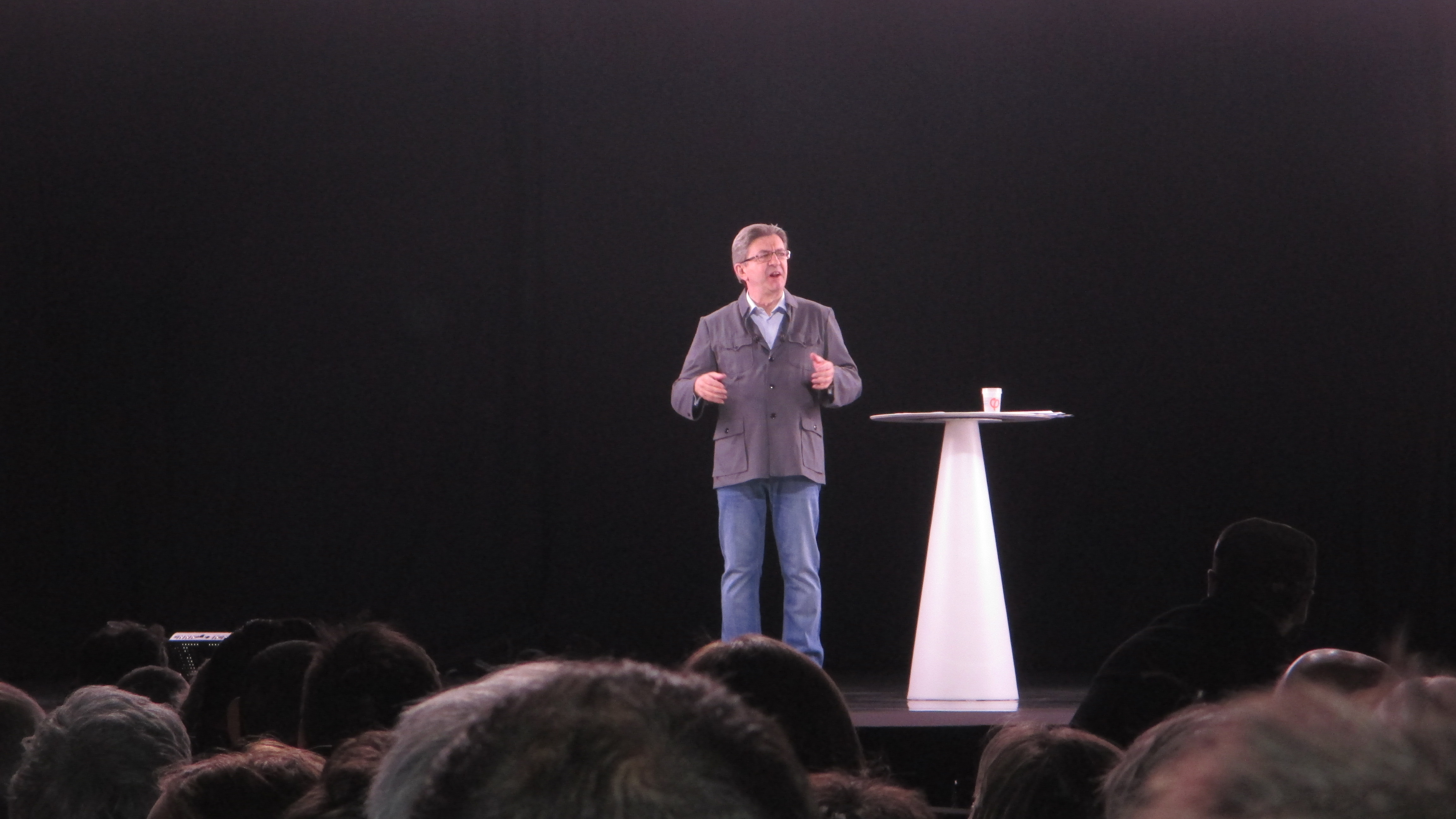 Jean-Luc Mélenchon durant son meeting à Dijon le 19 avril 2017.